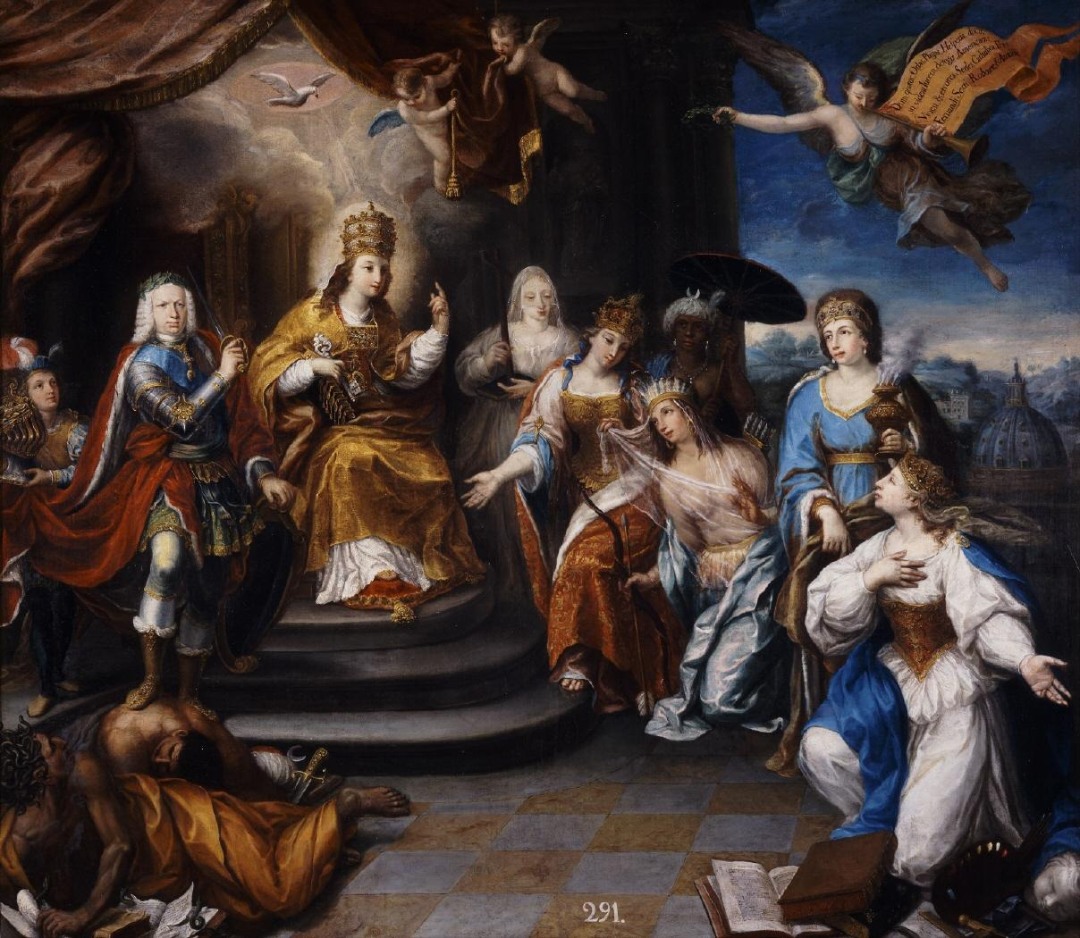 La obra es una alegoría del rey Fernando VI de España (1713-1759), y de la Iglesia Católica.